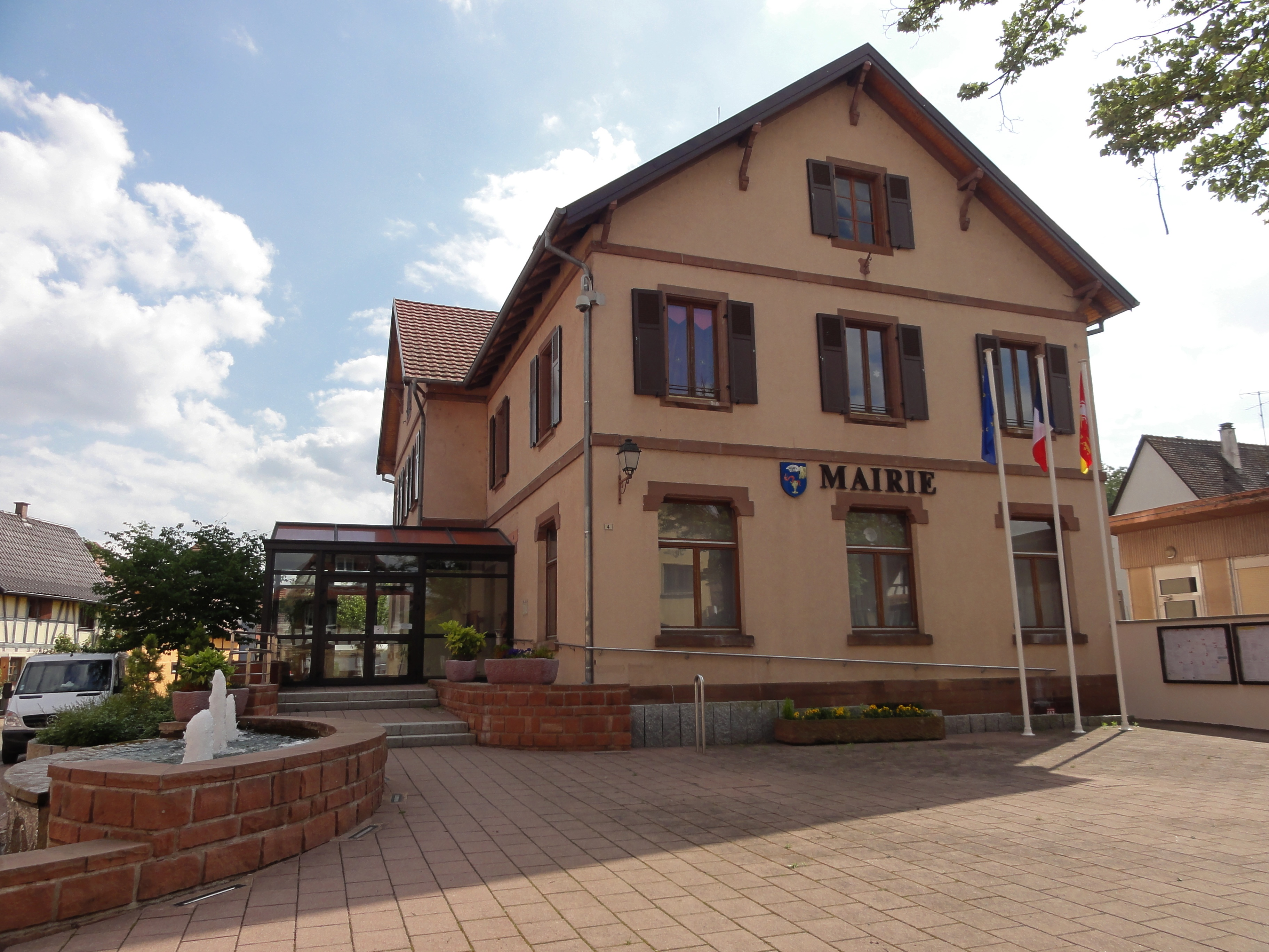 Alsace, Bas-Rhin, Hangenbieten, Mairie-école (XXe), 4 rue du 14-Juillet: .